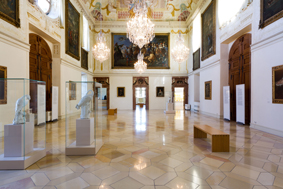 Innenansicht des Festsaals von Schloss Lustheim in der Schlossanlage Schleißheim